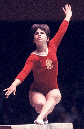 Jaroslava Sedláčková at the 1964 Olympics